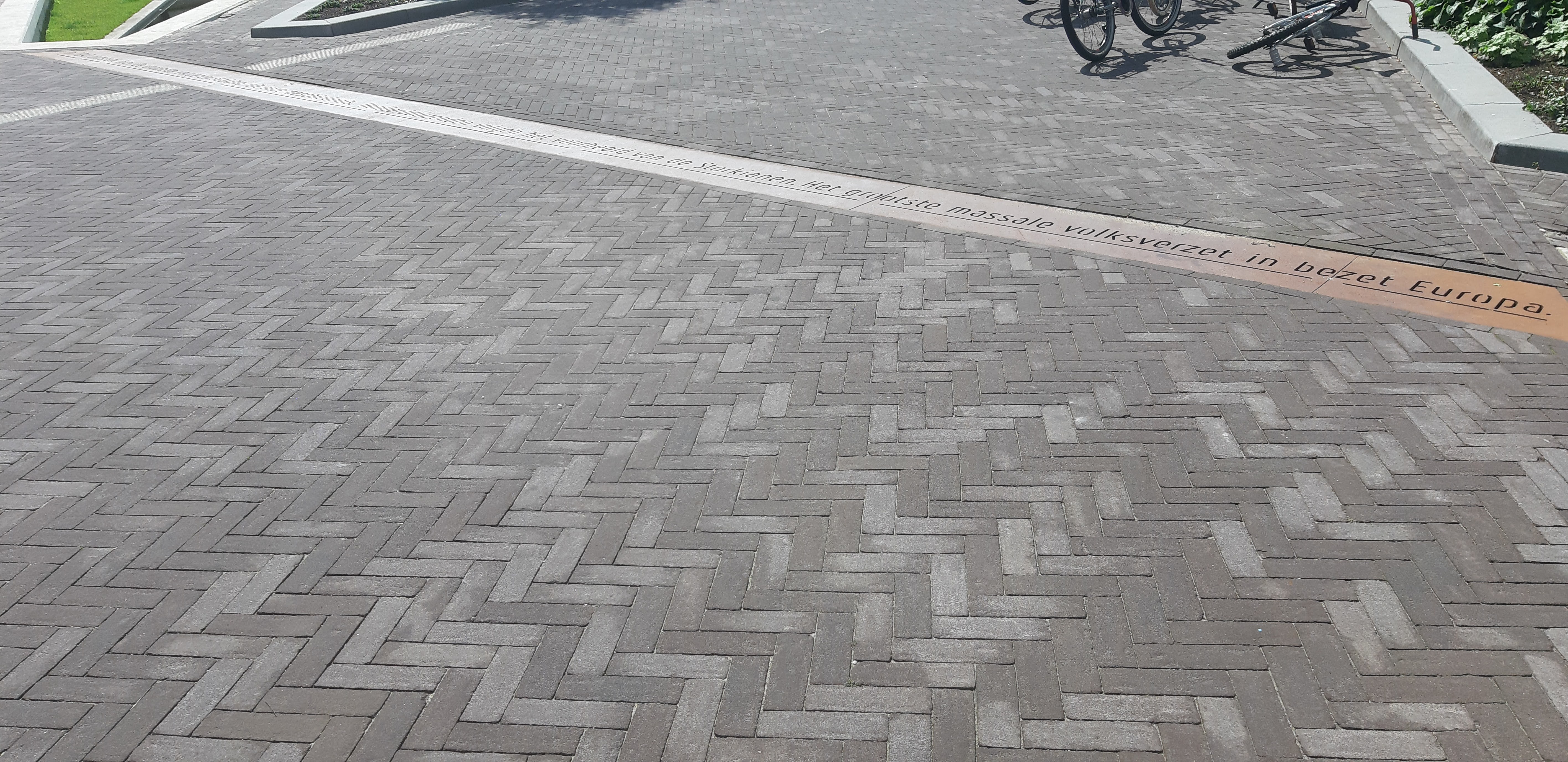 De volledige tekst, verdeeld over verschillende banen luidt: Er hoeft er maar één te beginnen. Arbeiders van Stork ontketenen op 29 april 1943 de landelijke April-meistakingen. In 1943 ontstaat hier de grootste vergeten staking uit onze geschiedenis. Honderdduizenden volgen het voorbeeld van de Storkianen. Het grootste massale volksverzet in bezet Europa. April-mei 1943 is een keerpunt in de oorlog. De bezetter slaat de stakingen bloedig neer, ten koste van vele slachtoffers en vermisten. In Nederland neemt hierdoor het verzet toe.